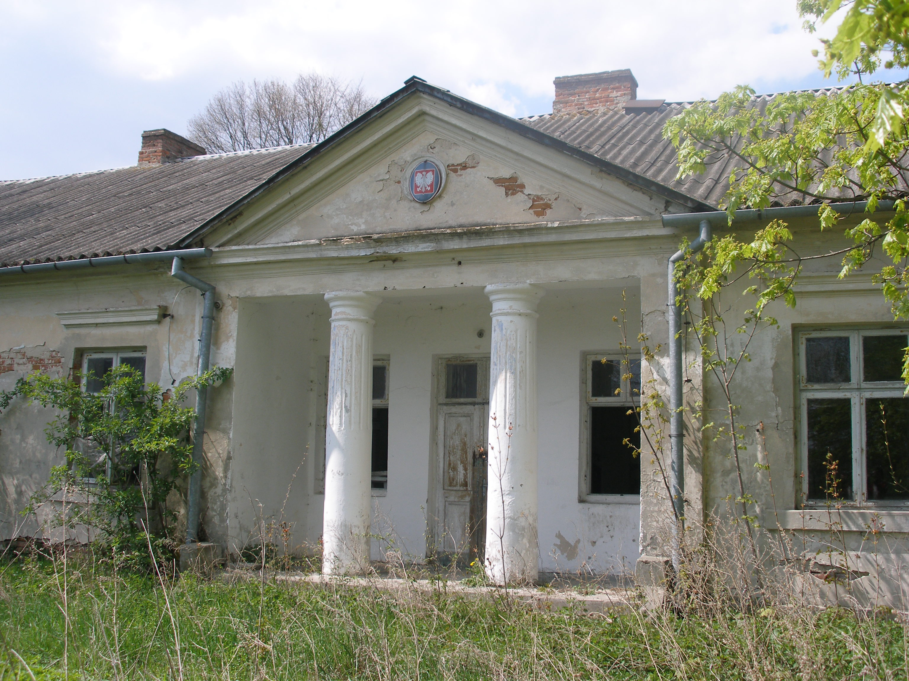 Dwór w Kalinówce, wejście